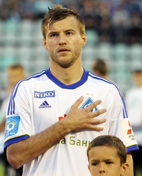 Андрій Ярмоленко - український футболіст під час виступів за Динамо на фіналі Кубку України